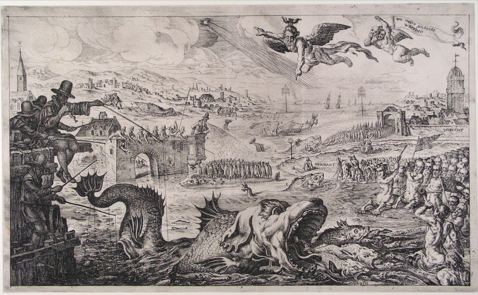 Le Grand poisson de Hollande, estampe de Pieter Feddes van Harlingen